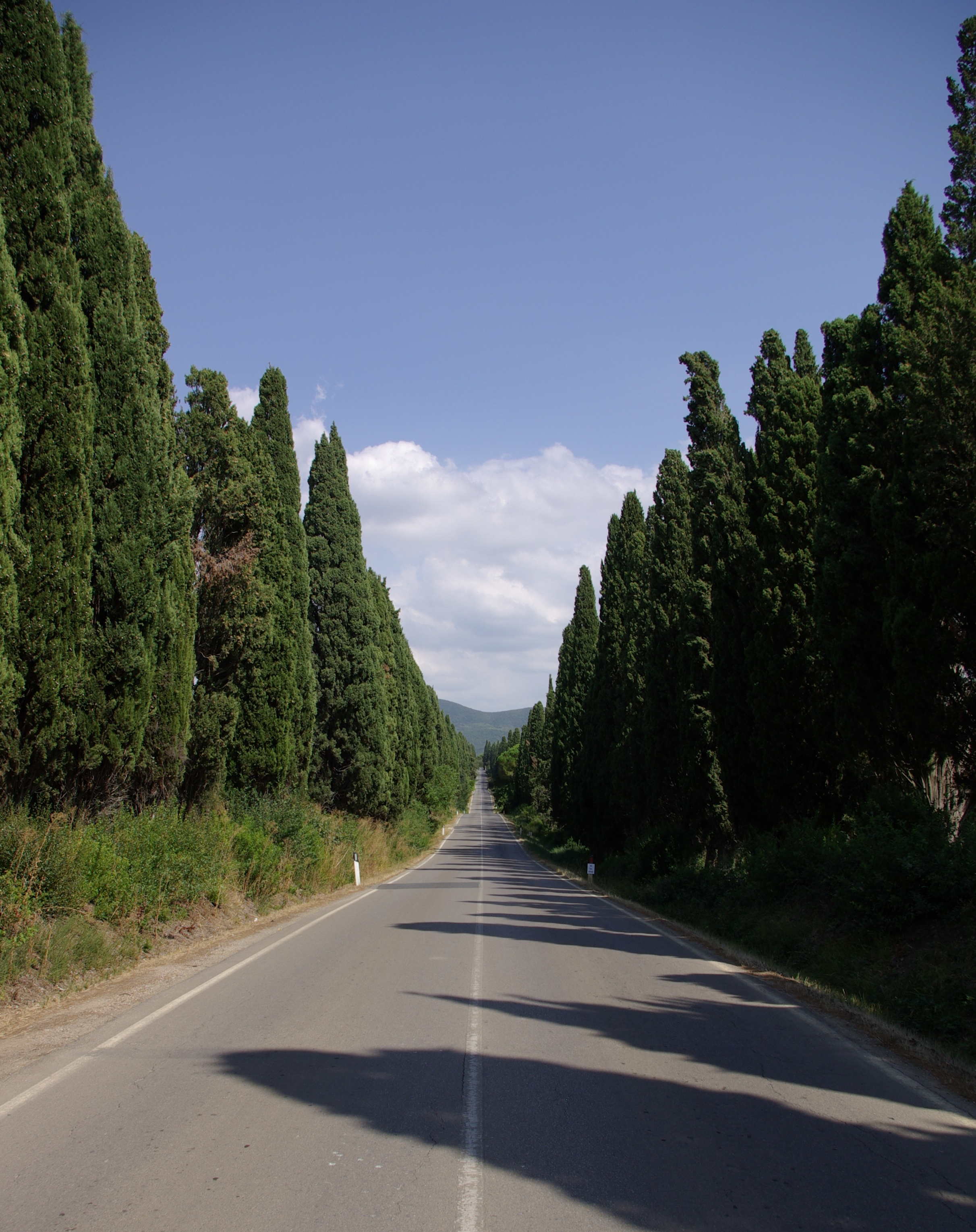 Zypressenallee bei Bolgheri (Castagneto Carducci)